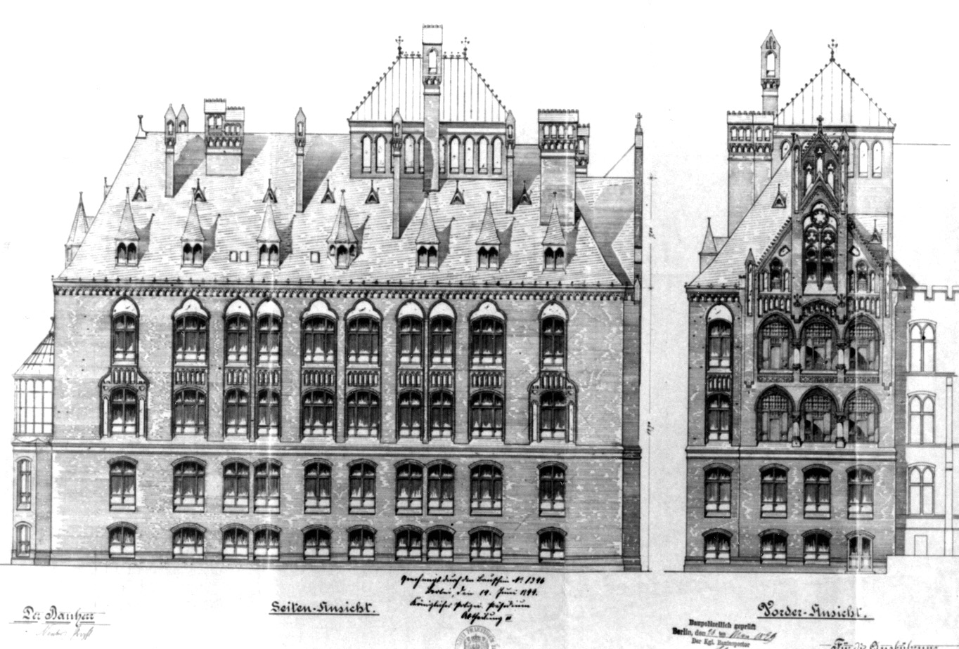 Ausführungsentwurf des katholischen Hedwigskrankenhauses (Erweiterungsbau, Rückgebäude) von 1898 des Architekten August Menken (1858-1903). Bauausführung von 1899 bis 1900. Mit Veränderungen erhalten.